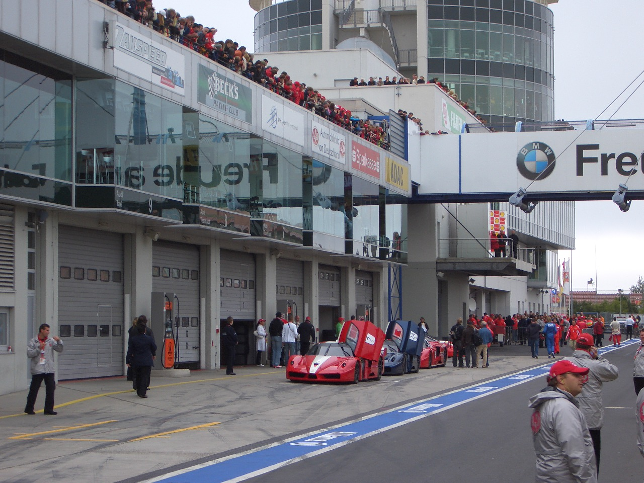 Ferrari-Racing-Day`s 2006, Nürburgring, 03.09.2006. FXX-Box.